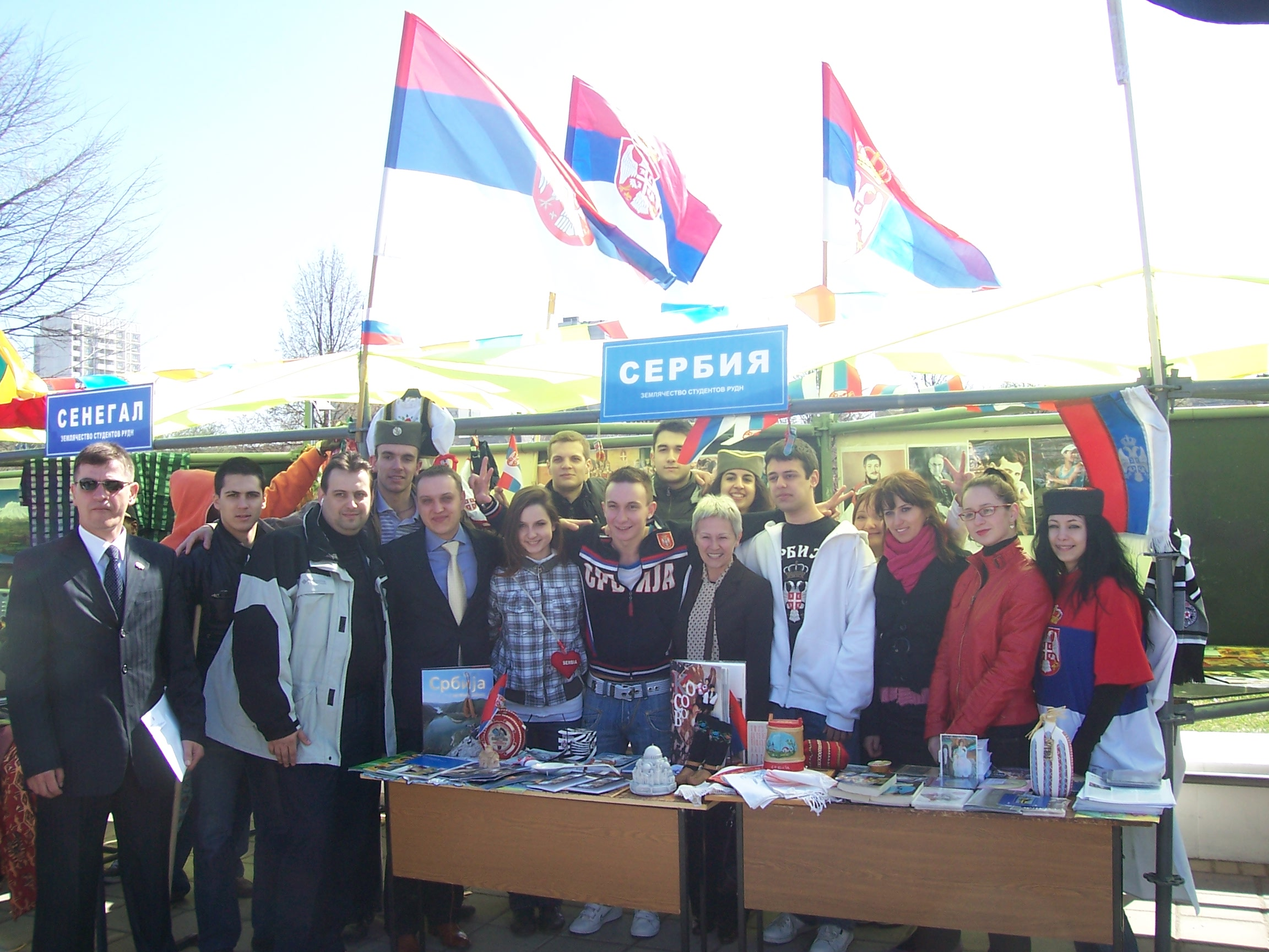 Посол Сербии в России Елица Курьяк с сербскими студентами РУДН (Москва) на празднике 1 мая 2009 года